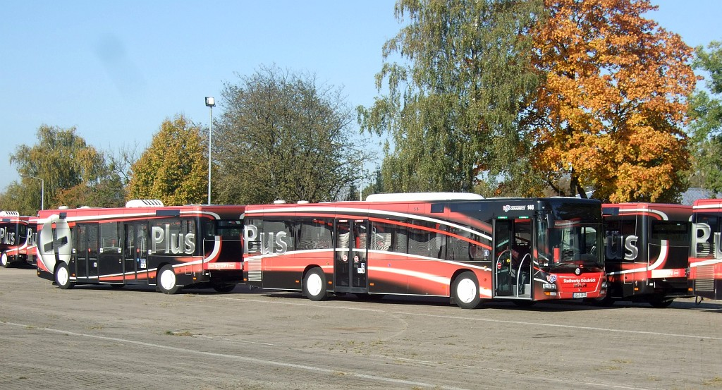 Die 2011 auf sieben Anhänger-Züge gewachsene „Plus-Bus“-Flotte der Osnabrücker Stadtwerke (23m/180Pers.)